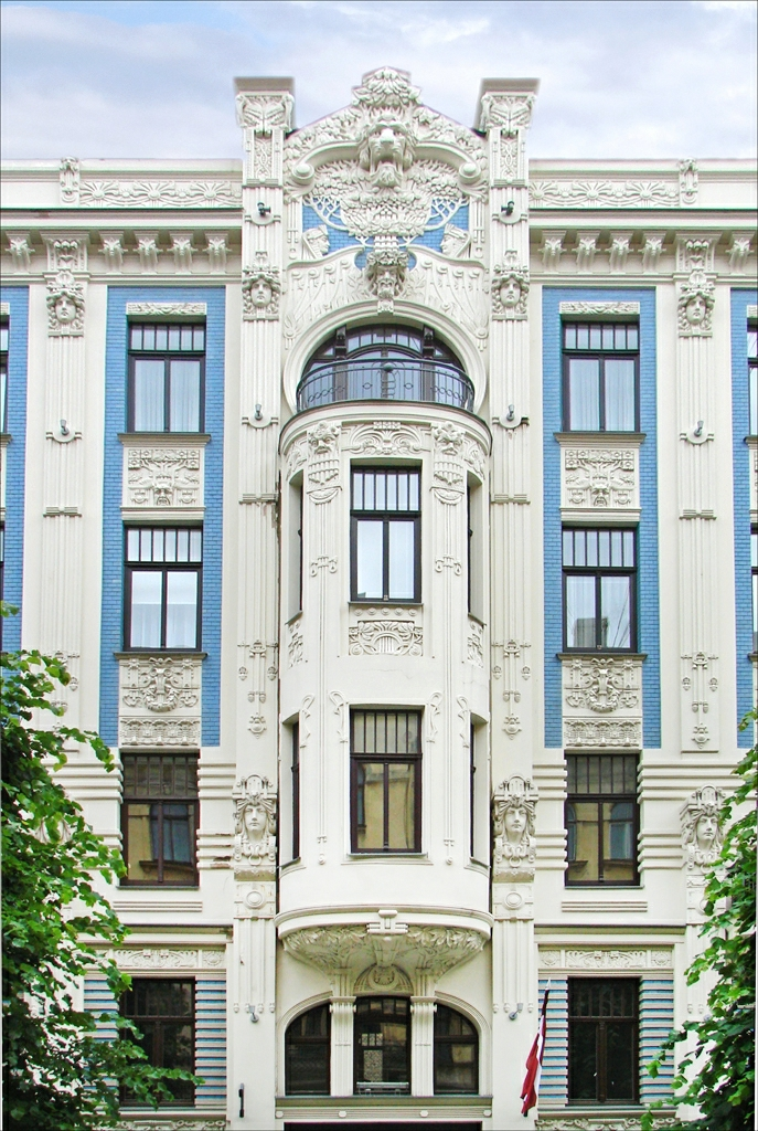 Vue de la partie centrale de l'immeuble art nouveau au n° 8 de la rue Alberta (Alberta Iela) à Riga Cet Immeuble art nouveau (jugendstil) a été conçu en 1903 par l'architecte Mikhail Eisenstein (1867—1921). Le site du musée d'art nouveau de Riga sur cet immeuble ___________ Riga, capitale de la Lettonie, est un parfait exemple de ville Art Nouveau. Son centre abrite la plus belle concentration de bâtiments Art nouveau au monde: plus d'un tiers d'entre eux appartiennent en effet à ce style. Cet ensemble architectural est inscrit sur la liste du Patrimoine mondial.... Extrait du site du réseau des villes art nouveau